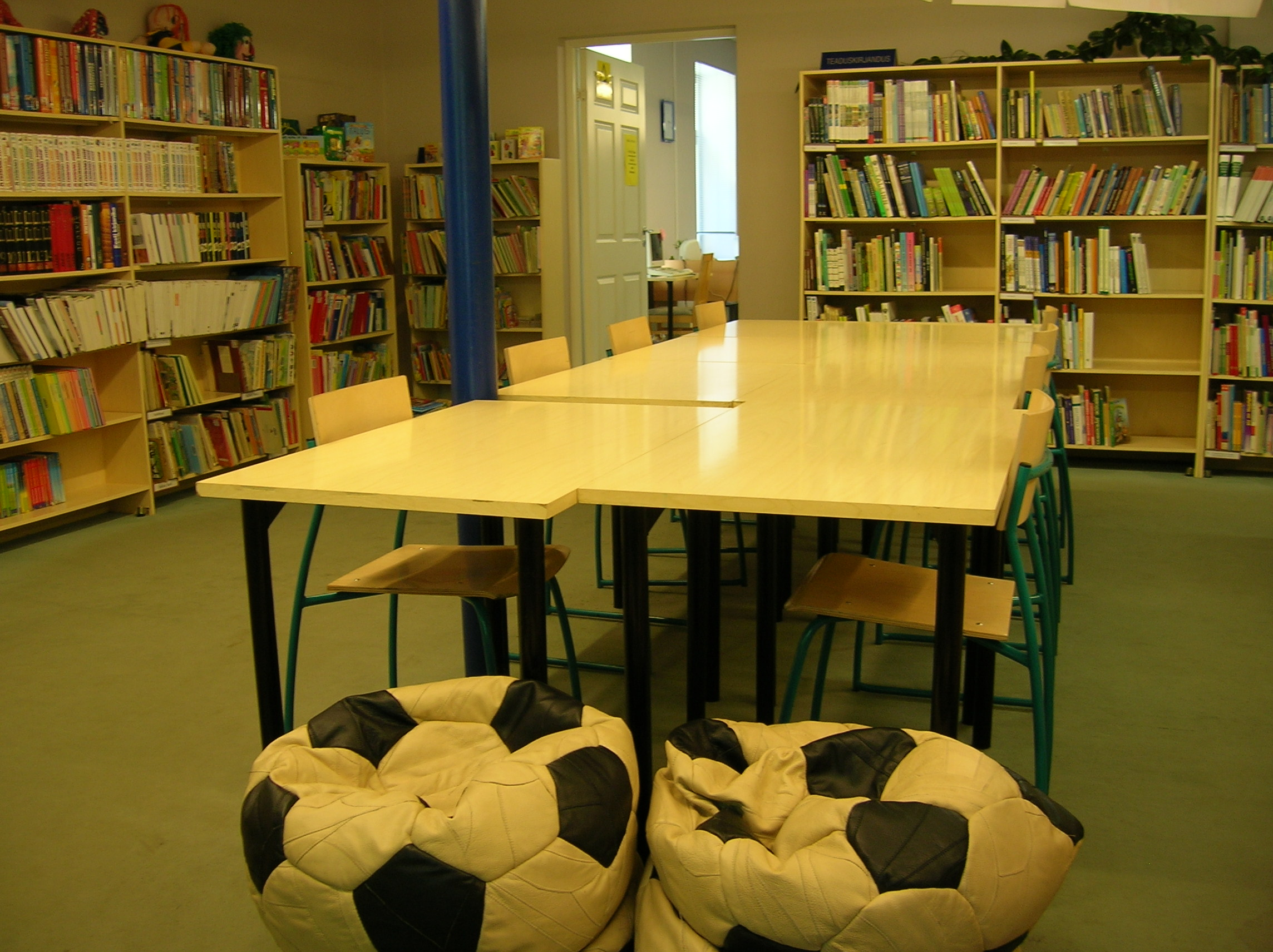 Laste lugemissaal 2